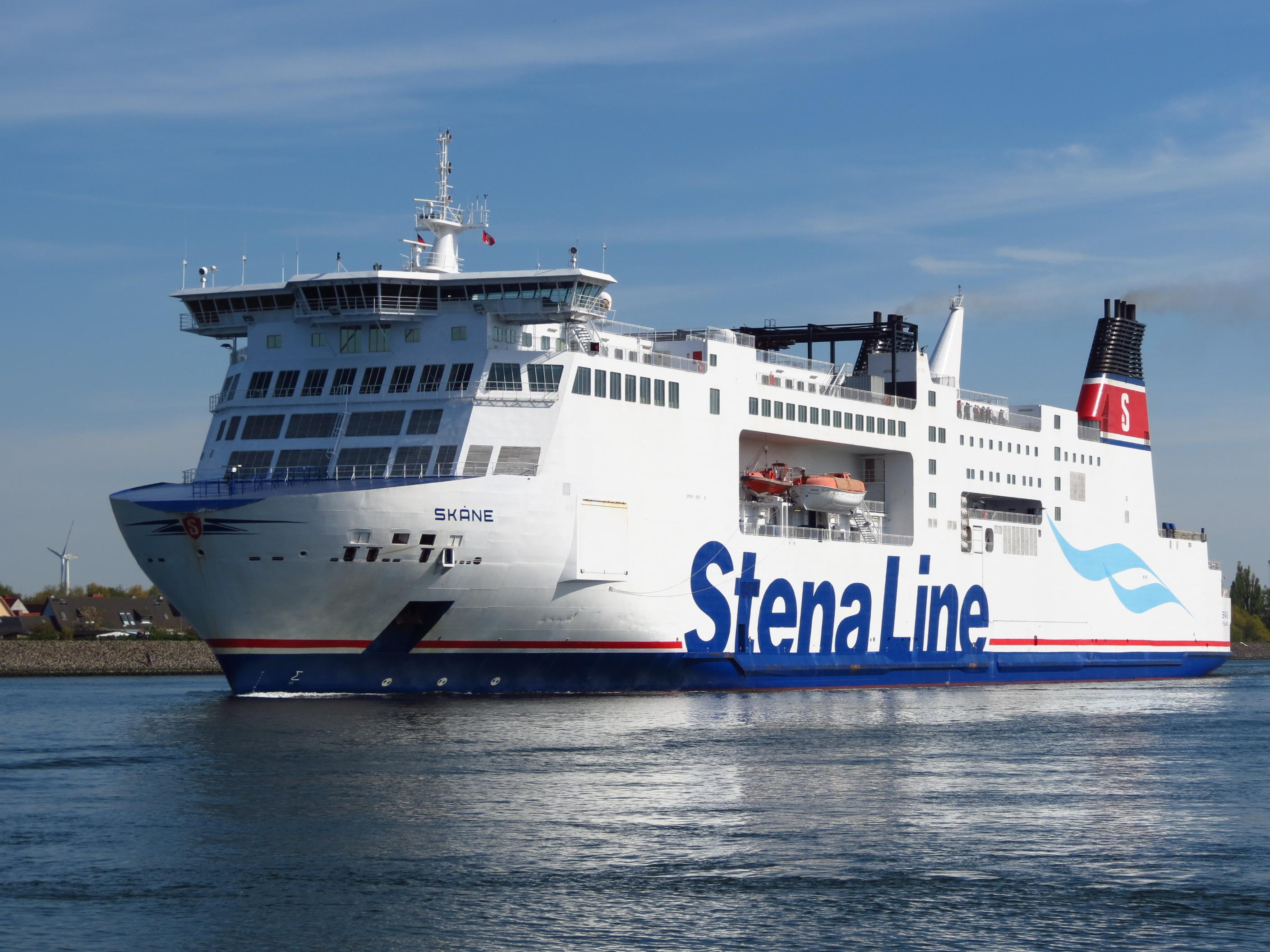 Fähre Skane in Rostock-Warnemünde (Seekanal).